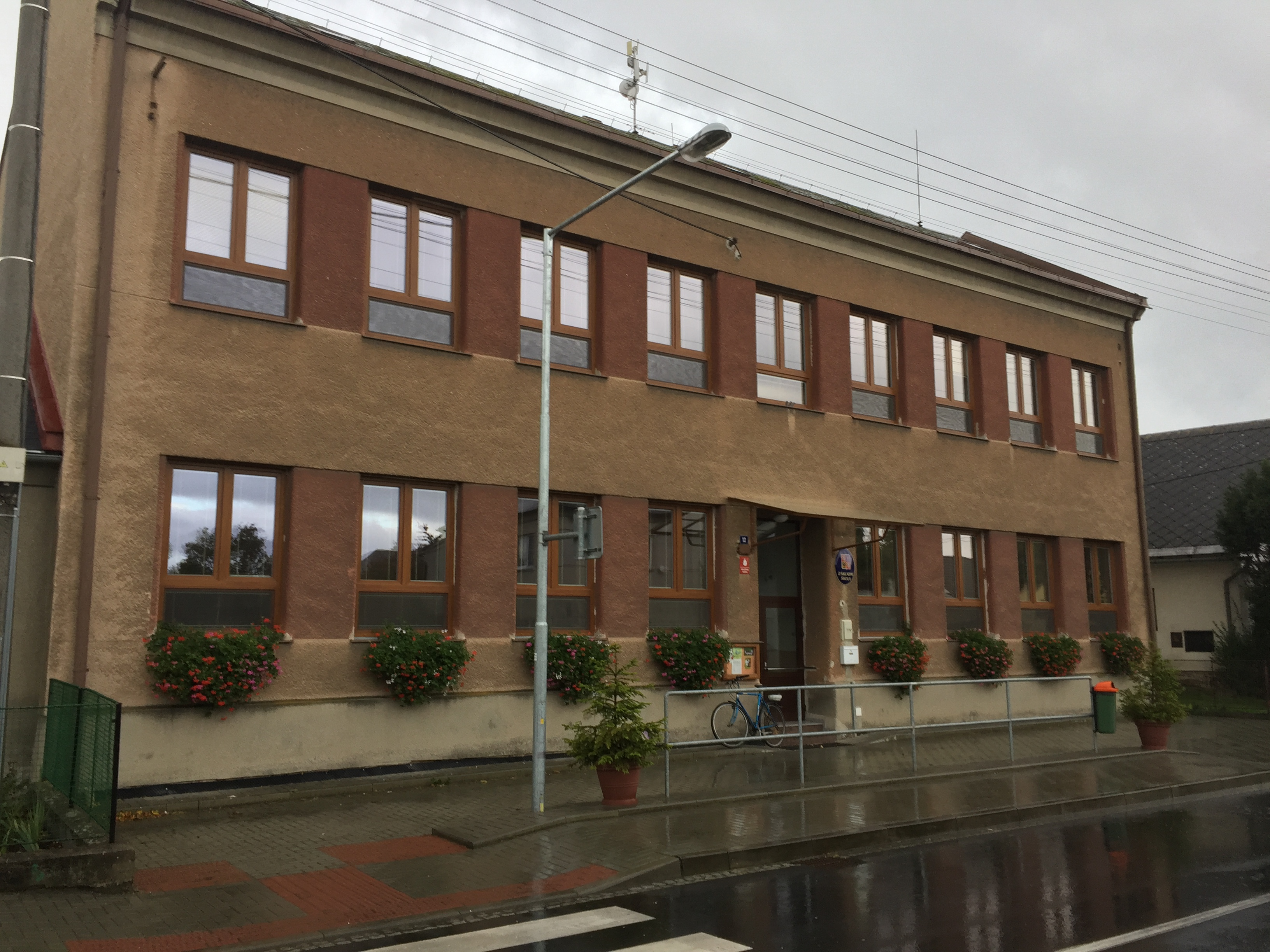 Autorem fotografie je Pumprla Jiří